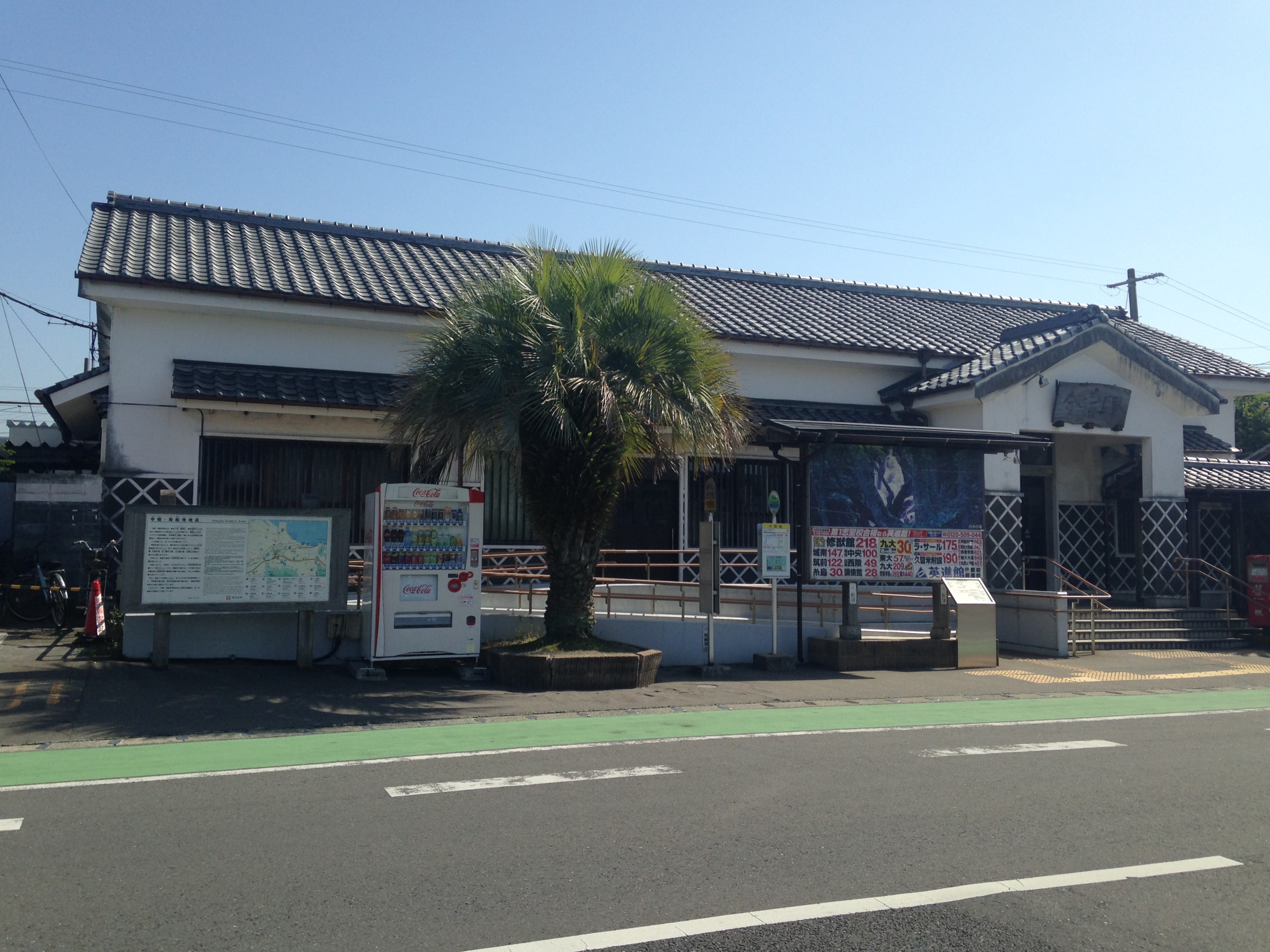 今宿駅駅舎